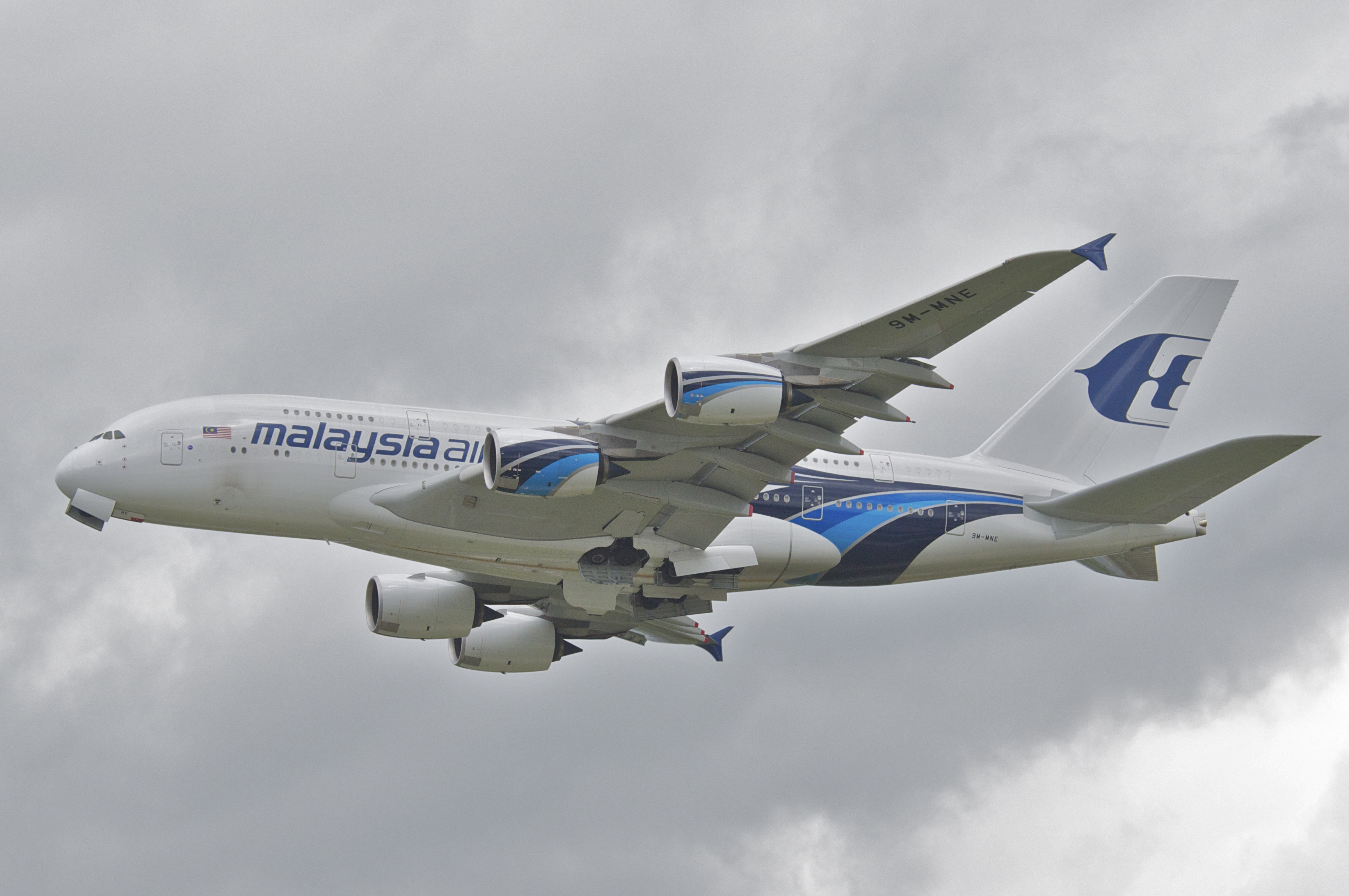 Departing as MAS3 to Kuala Lumpur...